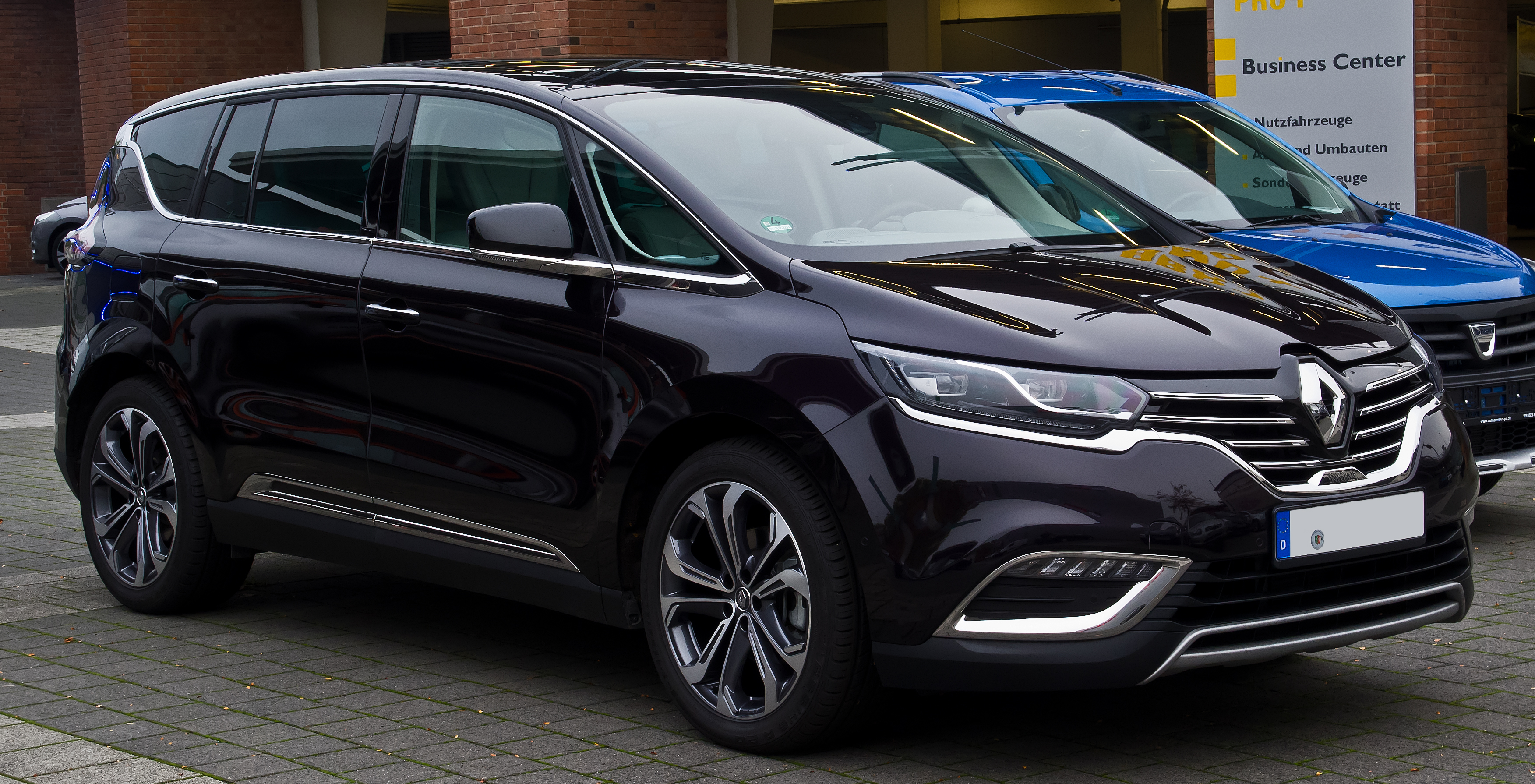 Renault Espace Initiale Paris ENERGY dCi 160 EDC (V)